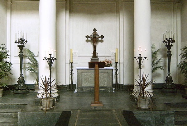 Kapelle Alter St.-Matthäus-Kirchhof, Berlin. Restauriertes Kreuz und Kerzenleuchter, neues Ambo: 2013. Förderverein EFEU e.V. Foto Ludger Wekenborg / User StMatthäus